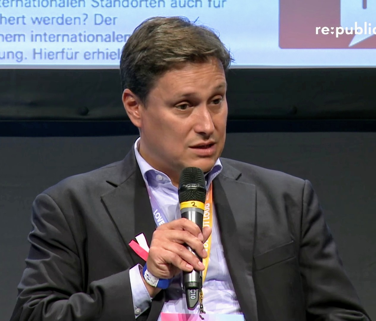 Find out more at: Kreatives Ballungszentrum oder Instrument der Ausbeutung – welche Rolle spielen Plattformökonomien in der zukünftigen Arbeitswelt? Was kann Crowd- und Clickworking zur modernen Wertschöpfung beitragen? Wo bleibt der Mensch? Das Panel „Plattformökonomie“ diskutiert Potenziale und Risiken eines digitalen Megatrends, der die Arbeit der Zukunft entscheidend prägen wird. Jan Marco Leimeister | Andreja Schneider-Dörr Dorothea Utzt Creative Commons Attribution-ShareAlike 3.0 Germany (CC BY-SA 3.0 DE)